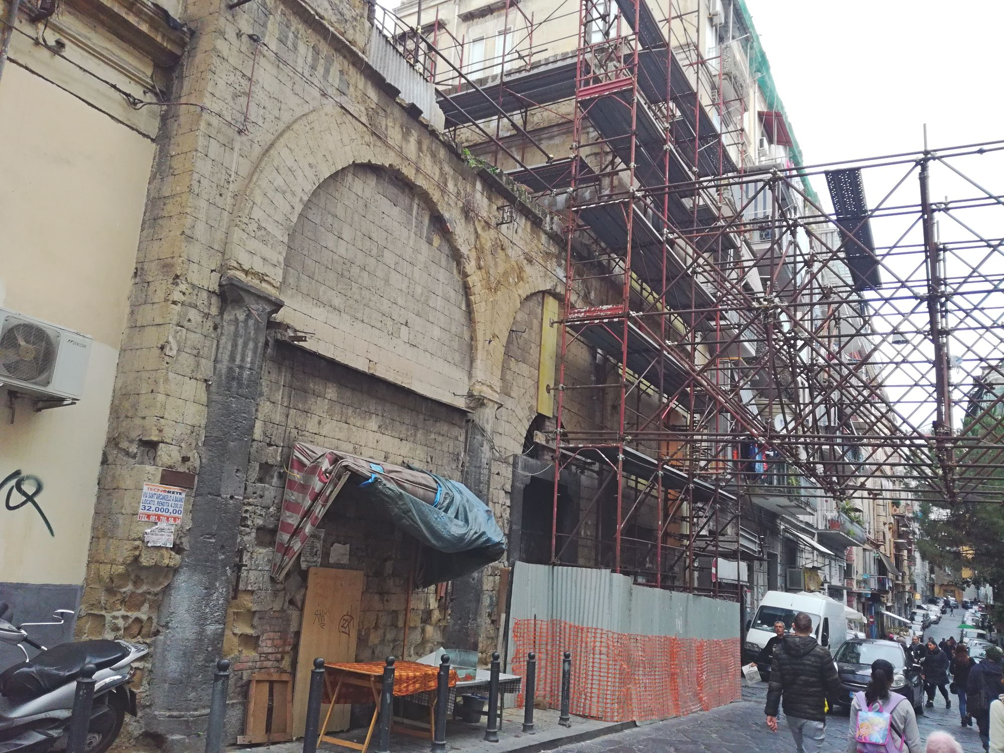 Chiesa di Santa Maria a Piazza, dirimpettaia a Sant'Agrippino a Forcella.